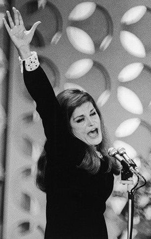 Dalida chantant au festival de San remo